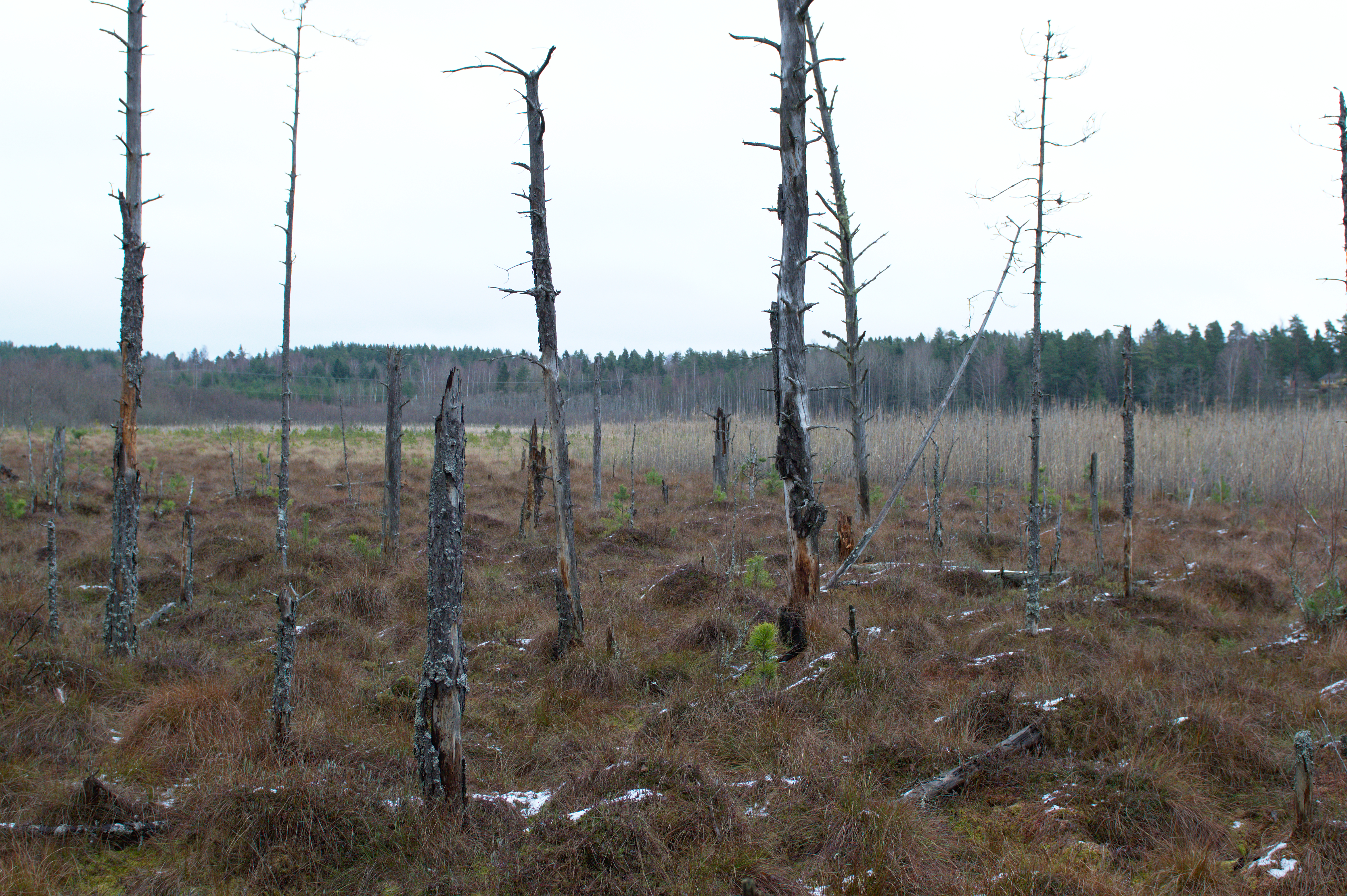 Tacktorpssjön i Eskilstuna kommun, sedd från söder.